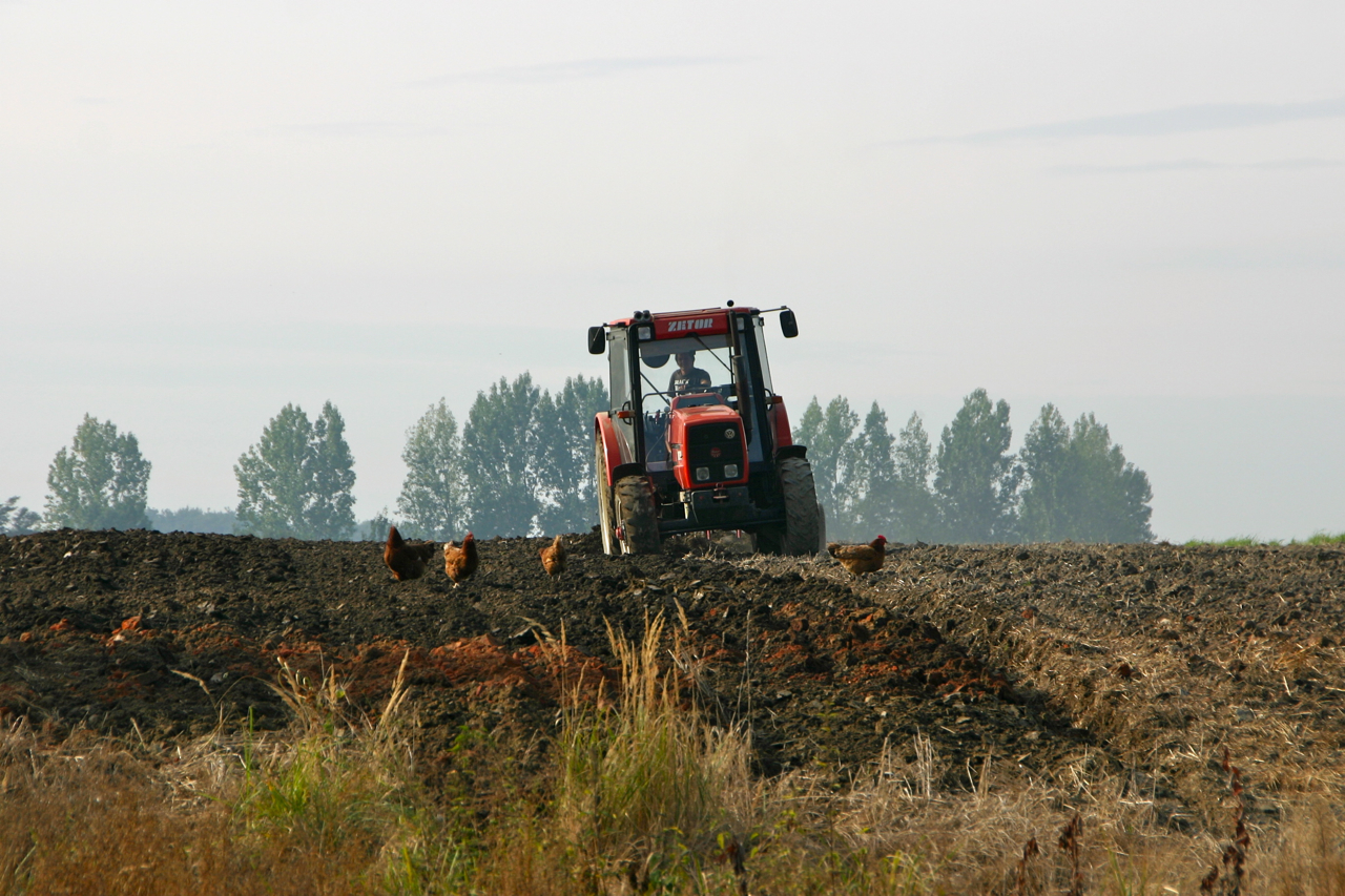 Orající traktor Zetor, hornoslezská obec Rzepcze